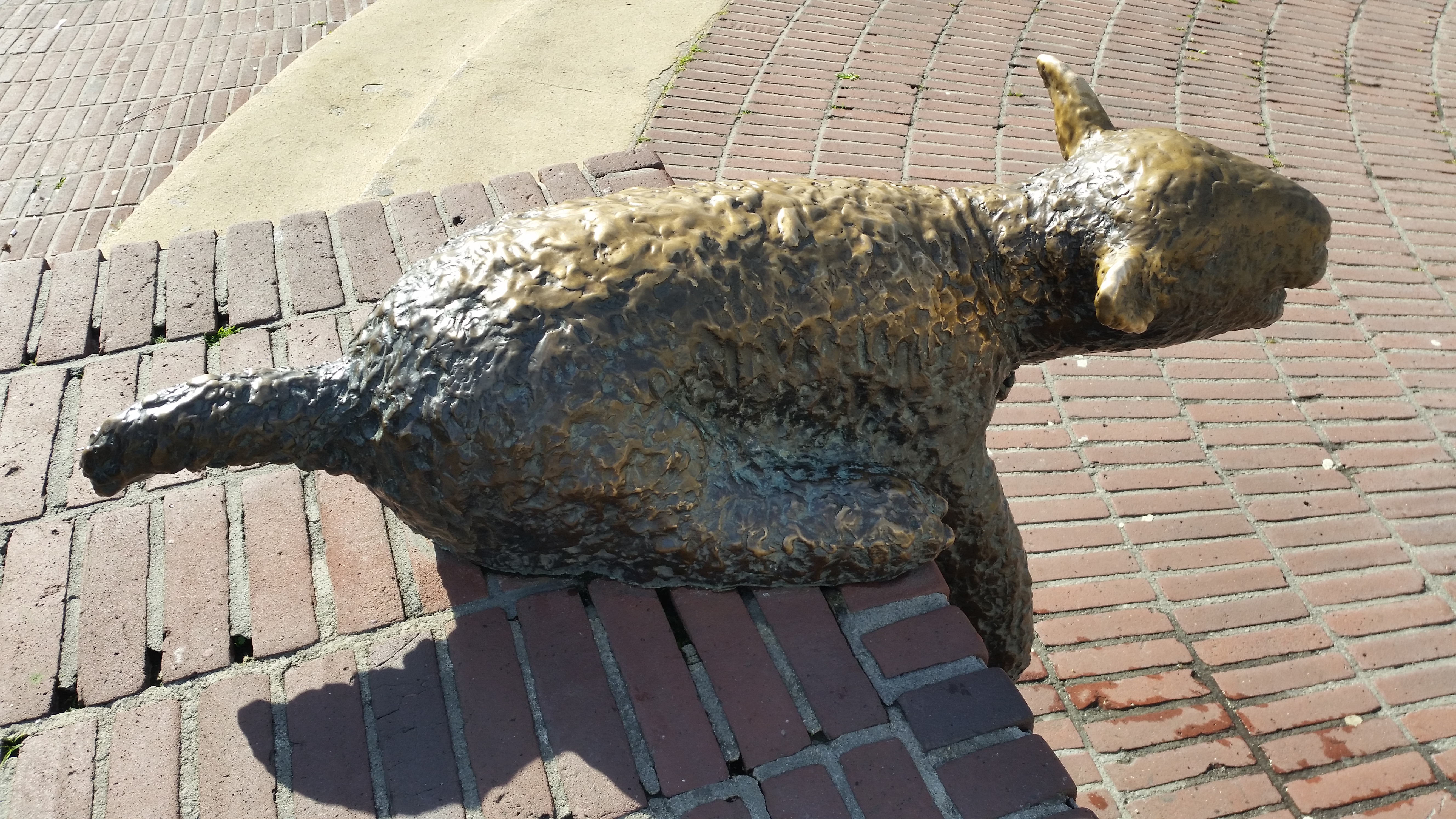 Acht schaapjes of lammetjes van Bolhuis in Osdorp, de voorste